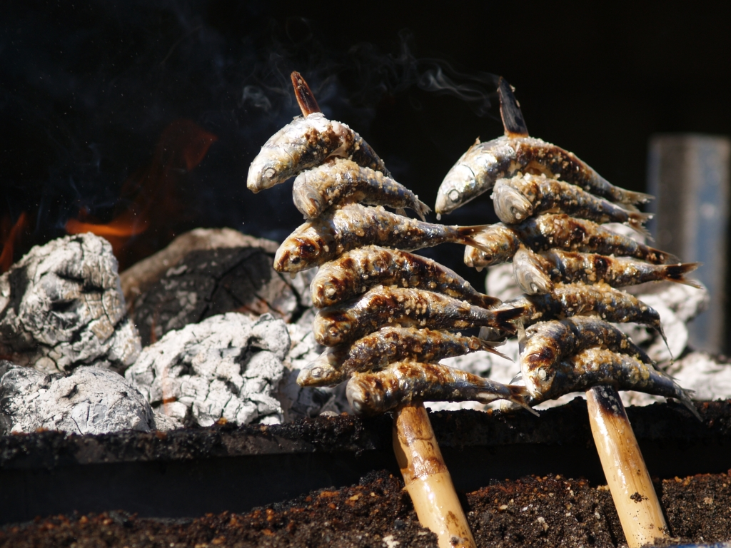 Si te pasas por Málaga debes probar los espetitos. If you visit Málaga dont forget to try an "espeto"